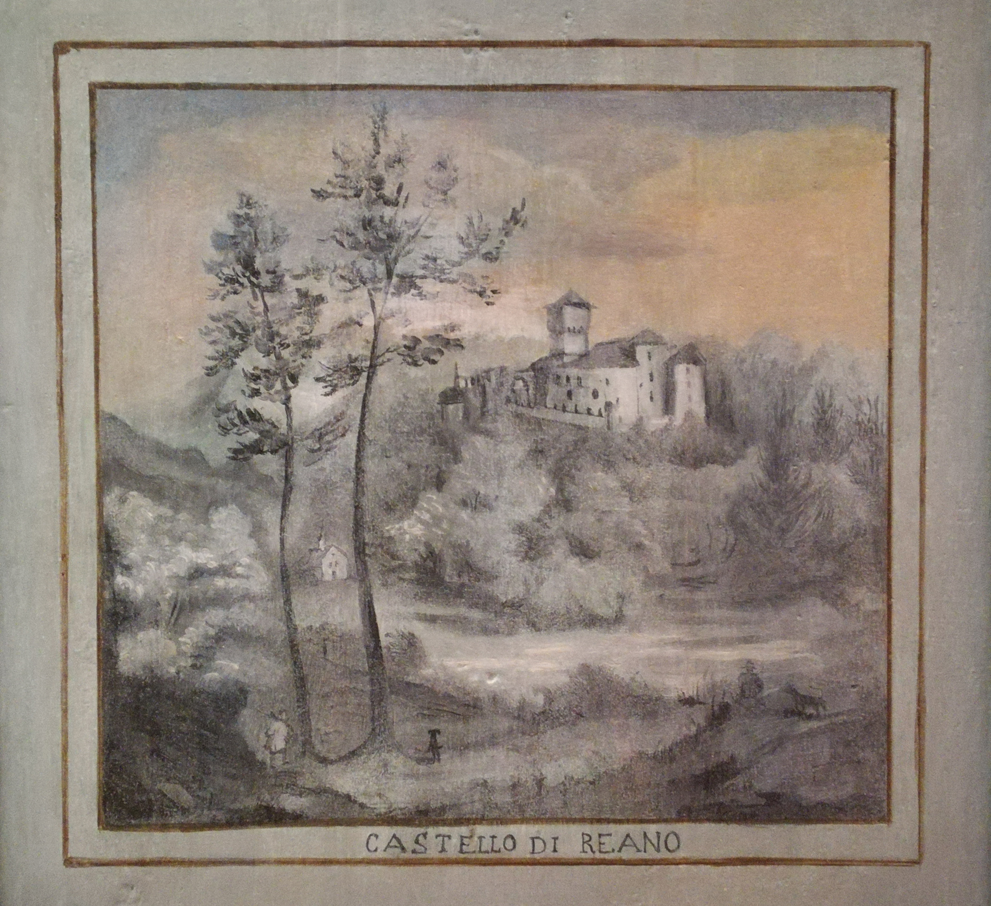 Affresco raffigurante il castello di Reano su una porta di salone del Castello di Aymavilles durante l'apertura straordinaria del cantier evento (Châteaux Ouverts, dal 4 al 26 agosto 2018). Aymavilles, Valle d'Aosta, Italia.